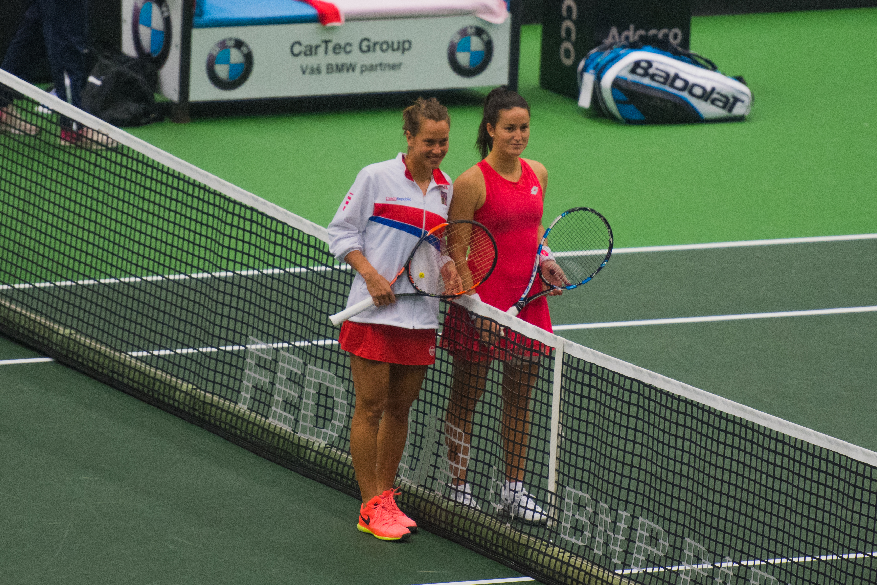 PPP_0502